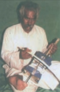 توفیق مهاوی در حال نواختن